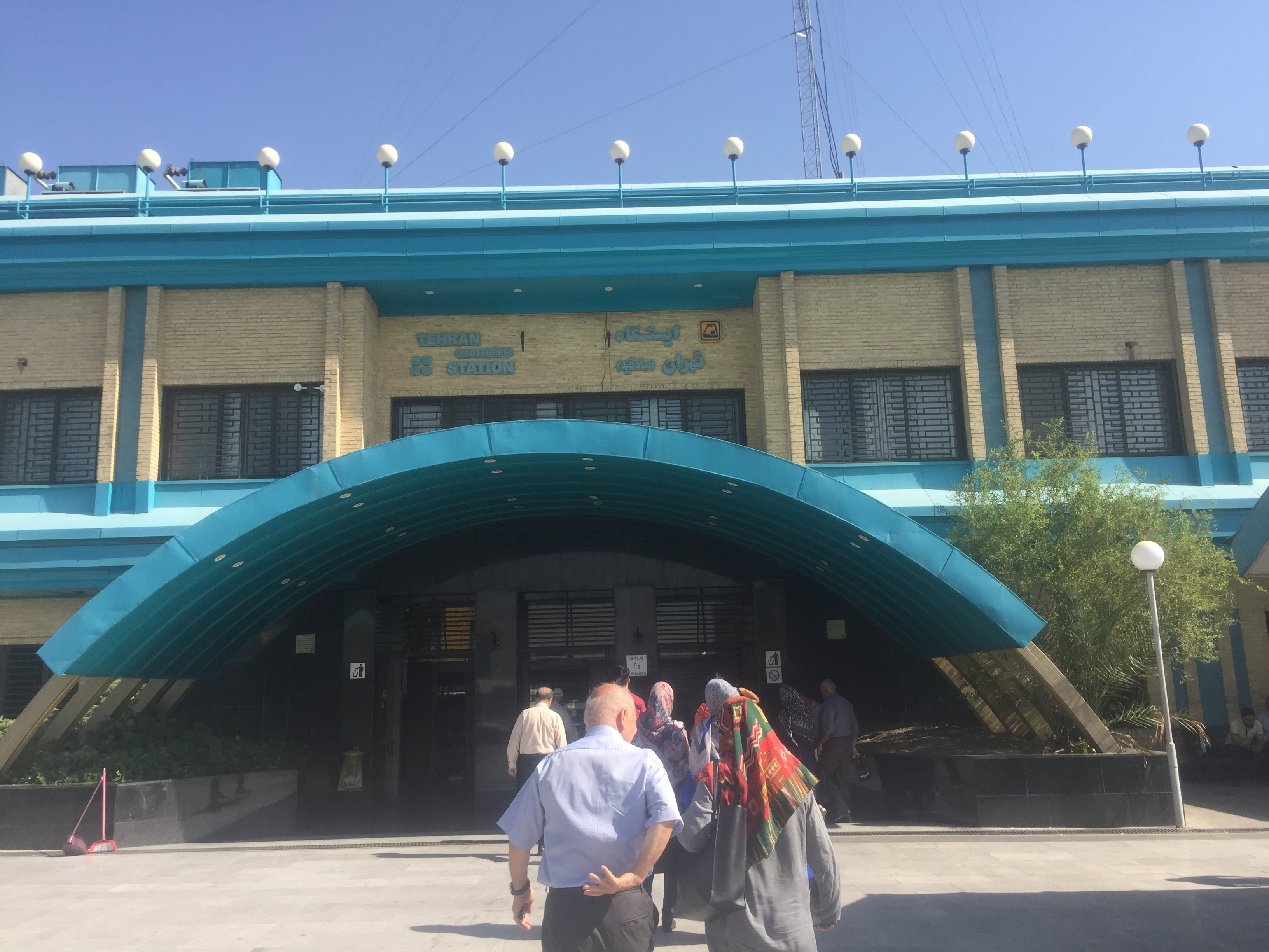 یکی از سه درب ورودی به ایستگاه مترو صادقیه